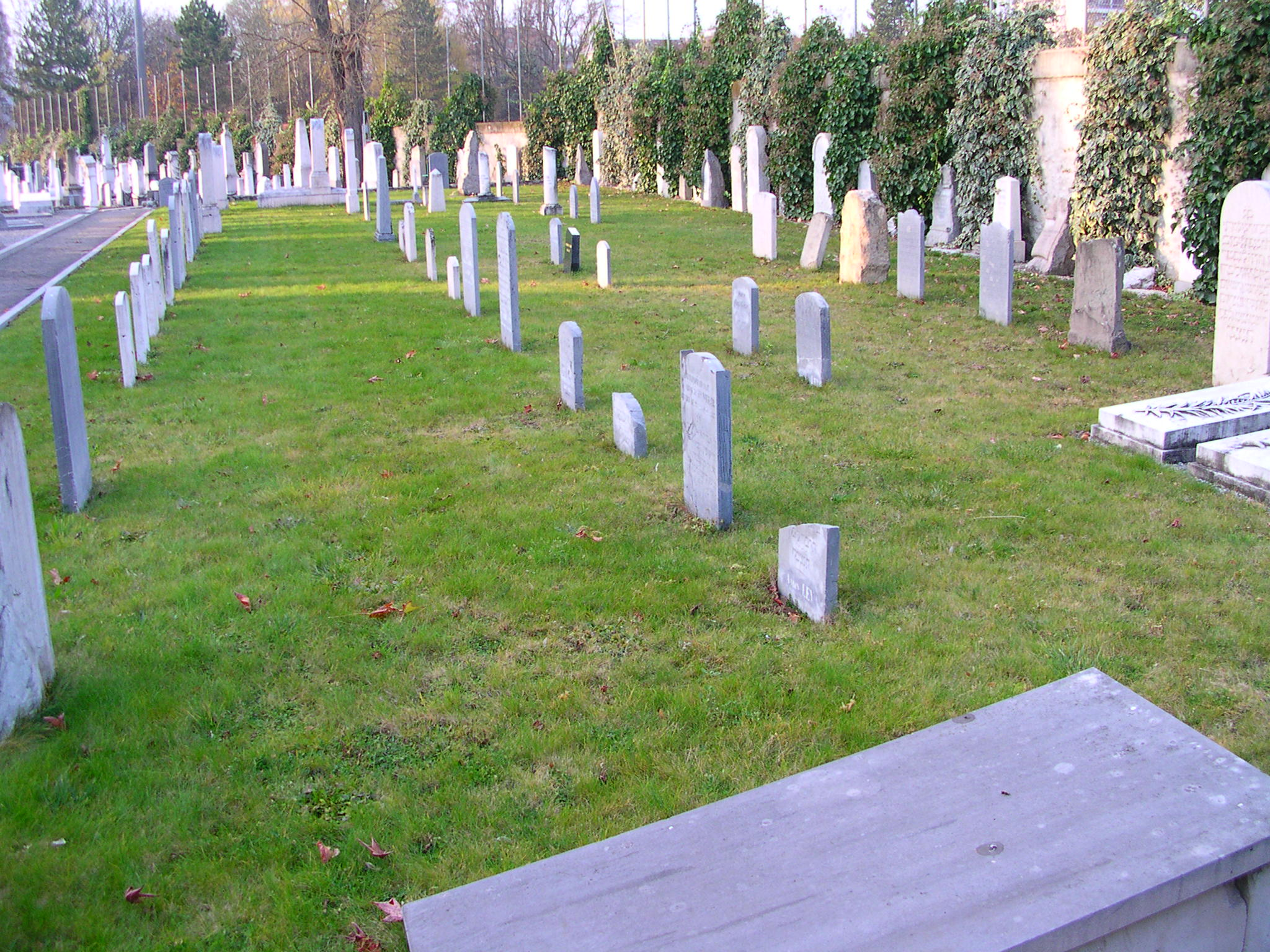 Parcelle de 1800 du Cimetière juif de Carouge. Parterre en herbe et stèles verticales de tradition ashkénaze pour l'essentiel.